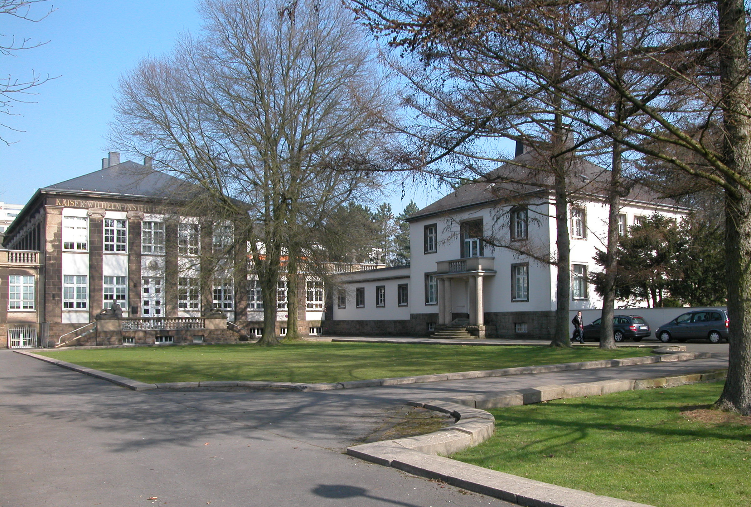 Max-Planck-Institut für Kohlenforschung - 45470 Mülheim an der Ruhr 51°24'59.22"N 6°53'6.64"E Object location51° 24′ 59.22″ N, 6° 53′ 06.64″ E